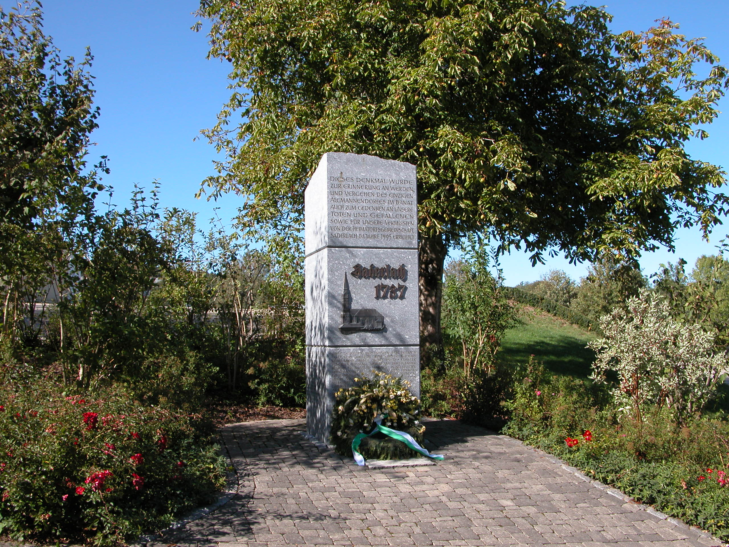 Vertriebenendenkmal der Saderlach-Alemannen in Görwihl.